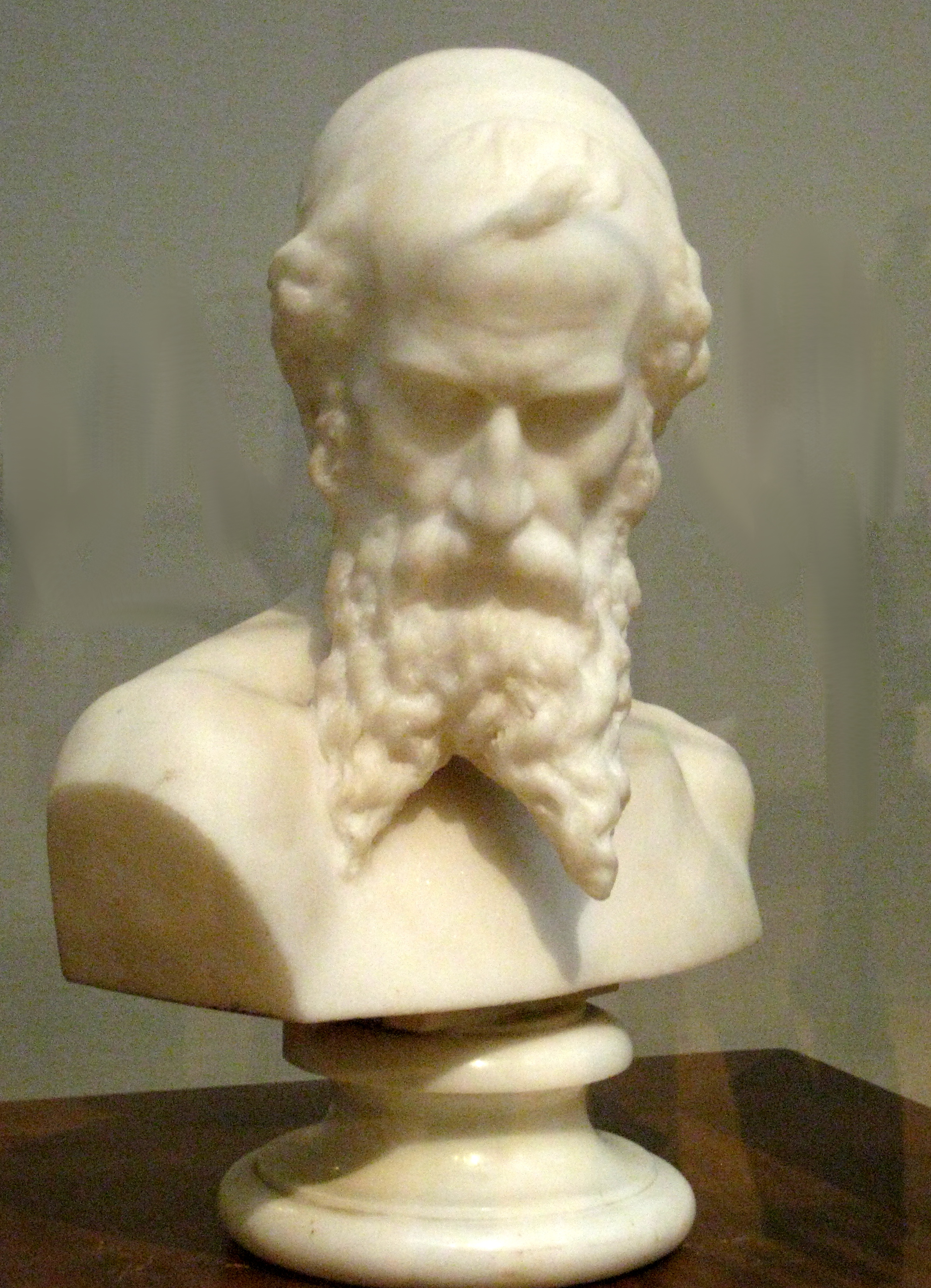 Марк Антокольский. "Голова еврея (Натан Мудрый)". 1873. Мрамор. ГТГ. Этюд головы к композиции "Нападение инквизиции на евреев в Испании во время тайного празднования ими Пасхи".